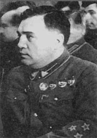 Mikhail Petrovich Frinovsky (Михаил Петрович Фриновский), deputy head of the NKVD, (b.1898-d.1940)